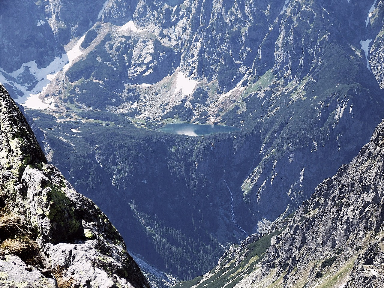 Dolina Ciężka, Ciężki Staw (Tatra Mountains). Widok z Doliny Litworowej